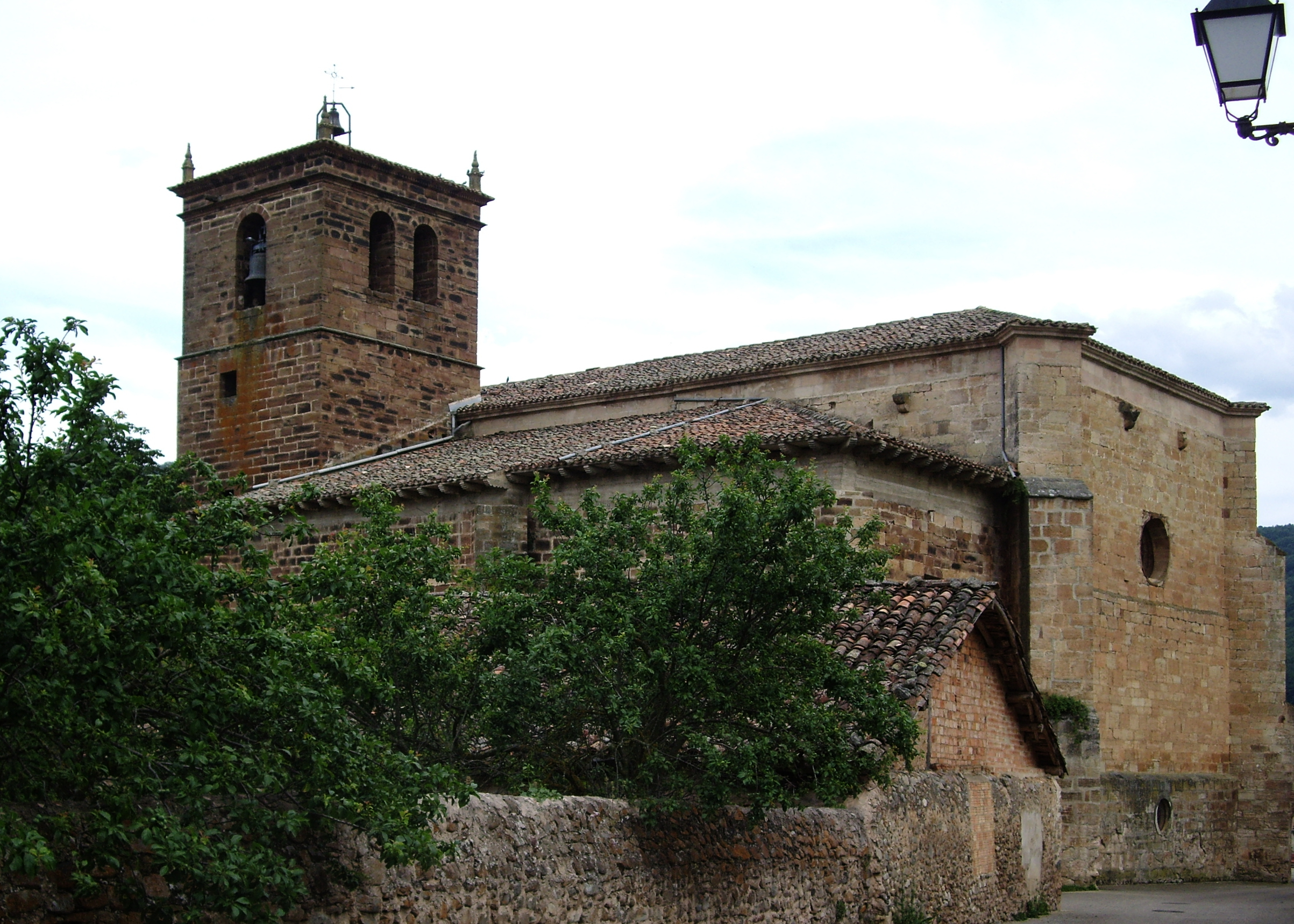 Iglesia de San Julián y Santa Basilisa en Ojacastro, La Rioja (España).